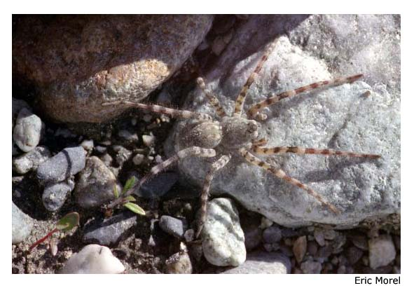 2004 Eric Morel Licosidae Artosa. Vallée de Champoléon, Hautes Alpes, France.